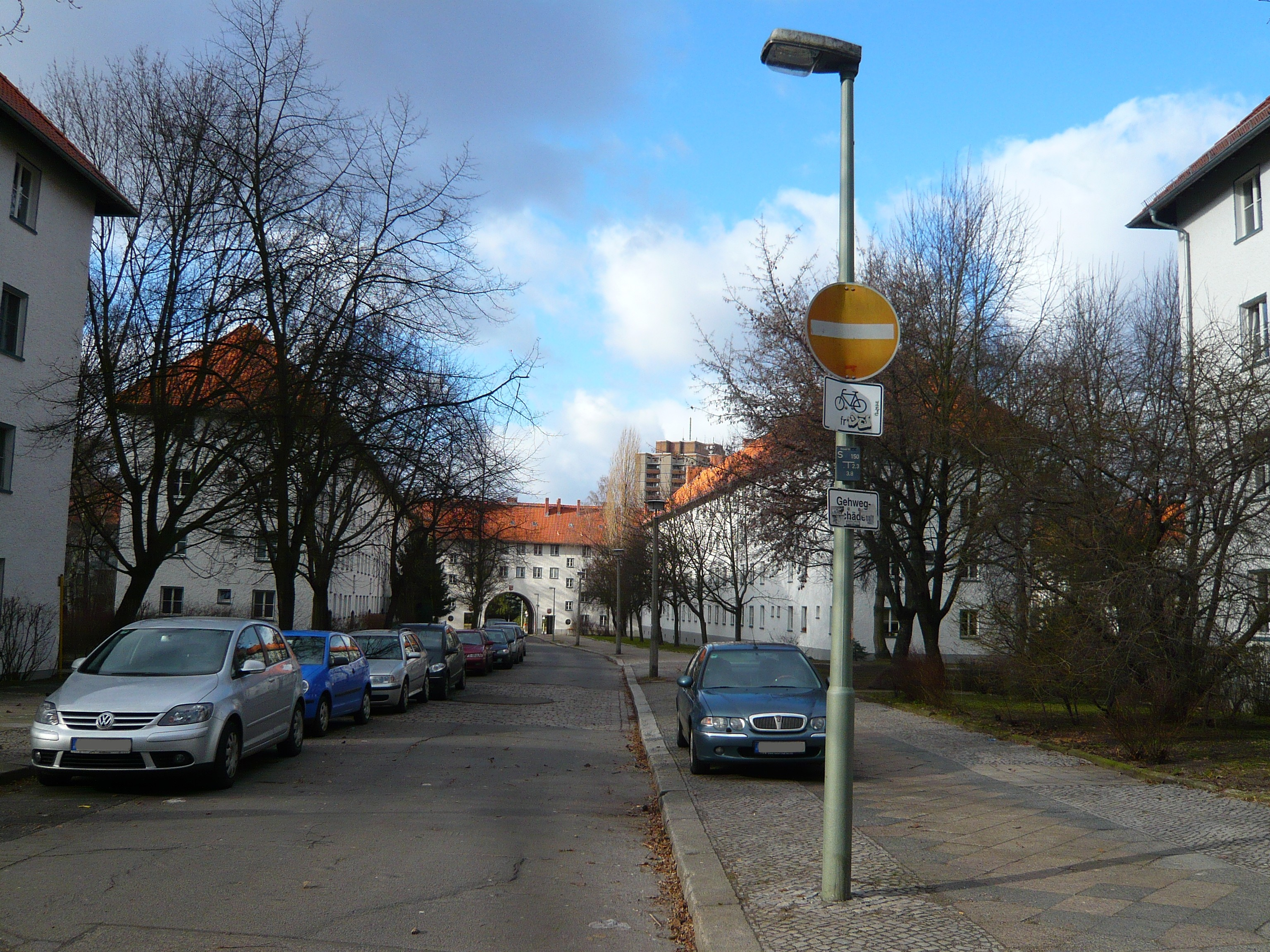 Straße in Prenzlauer Berg: Olga-Benario-Prestes-Straße